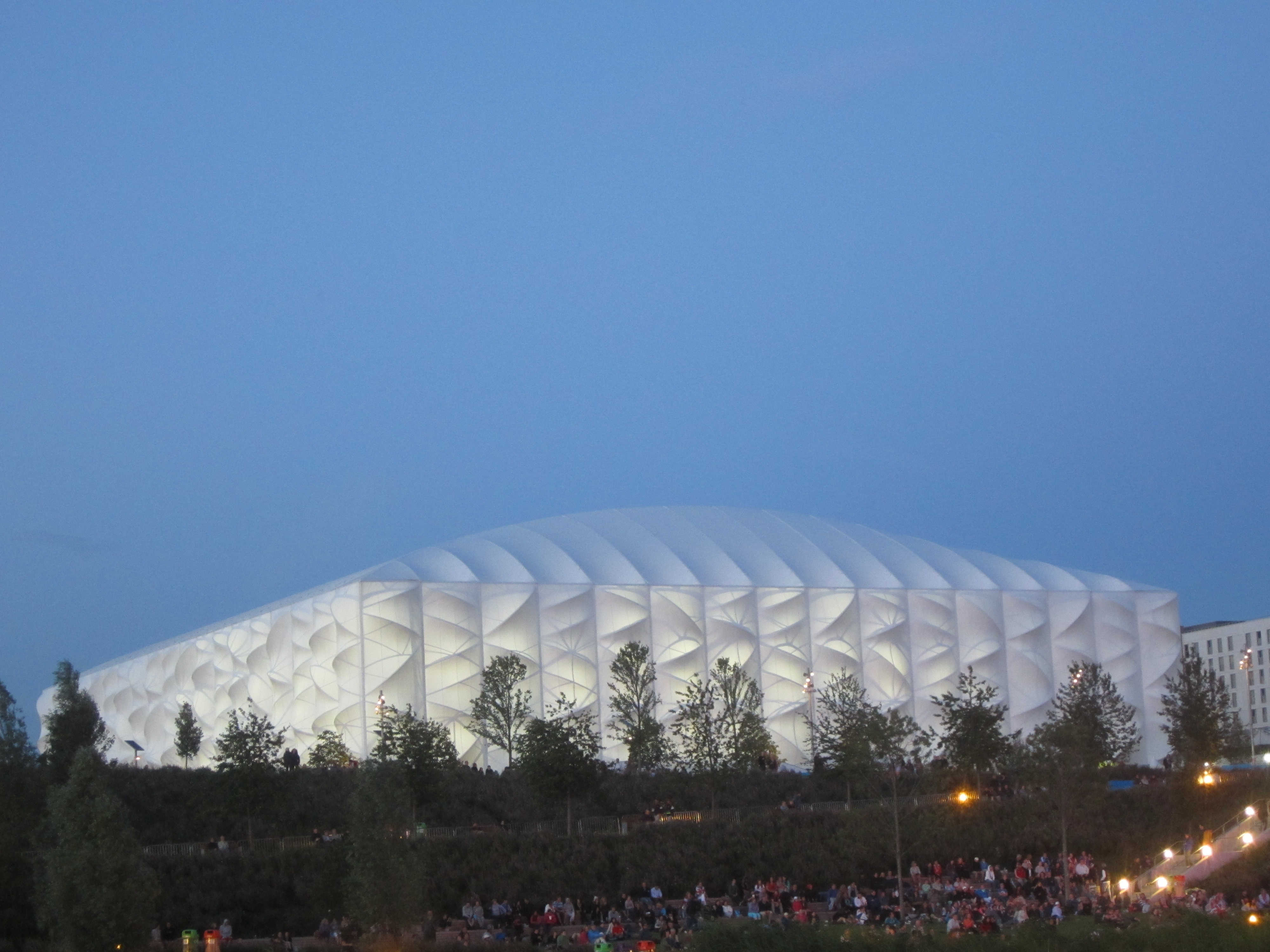 Basketball stadium at sunset 2012 Summer Olympics